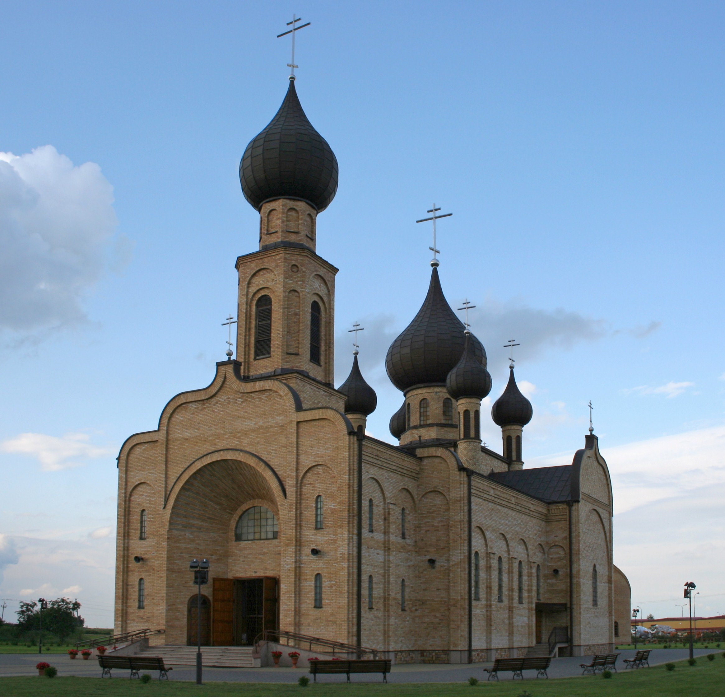 Cerkiew Zaśnięcia NMP w Bielsku Podlaskim.